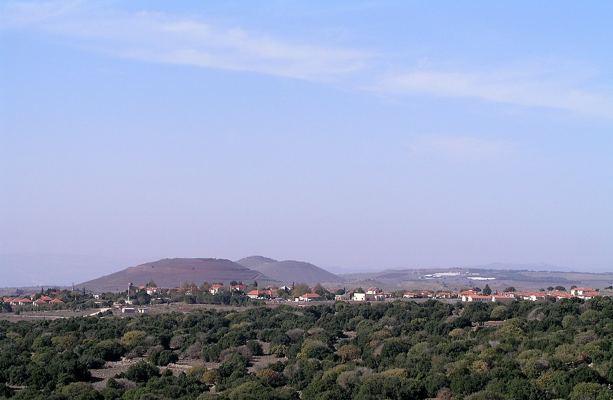 aloney-habashan